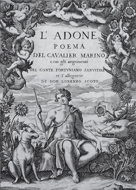 Edición de 1623 del poema Adone, de Marino. Biblioteca Nacional, Madrid